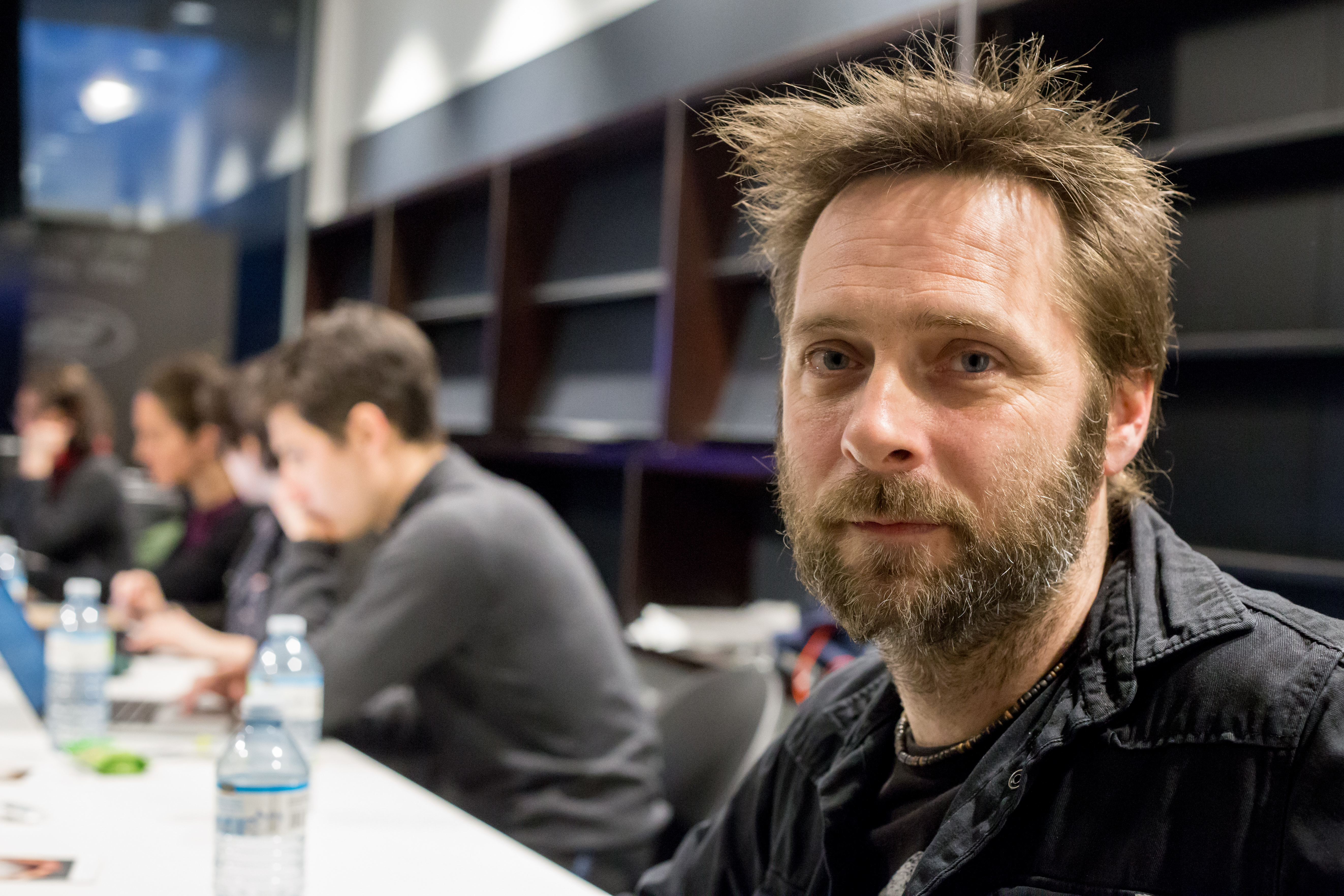 Ateliers Wikipédia sur le cinéma d'animation à la Médiathèque Guy-L.-Coté de la Cinémathèque québécoise. En compagnie du cinéaste d'animation Patrick Bouchard.